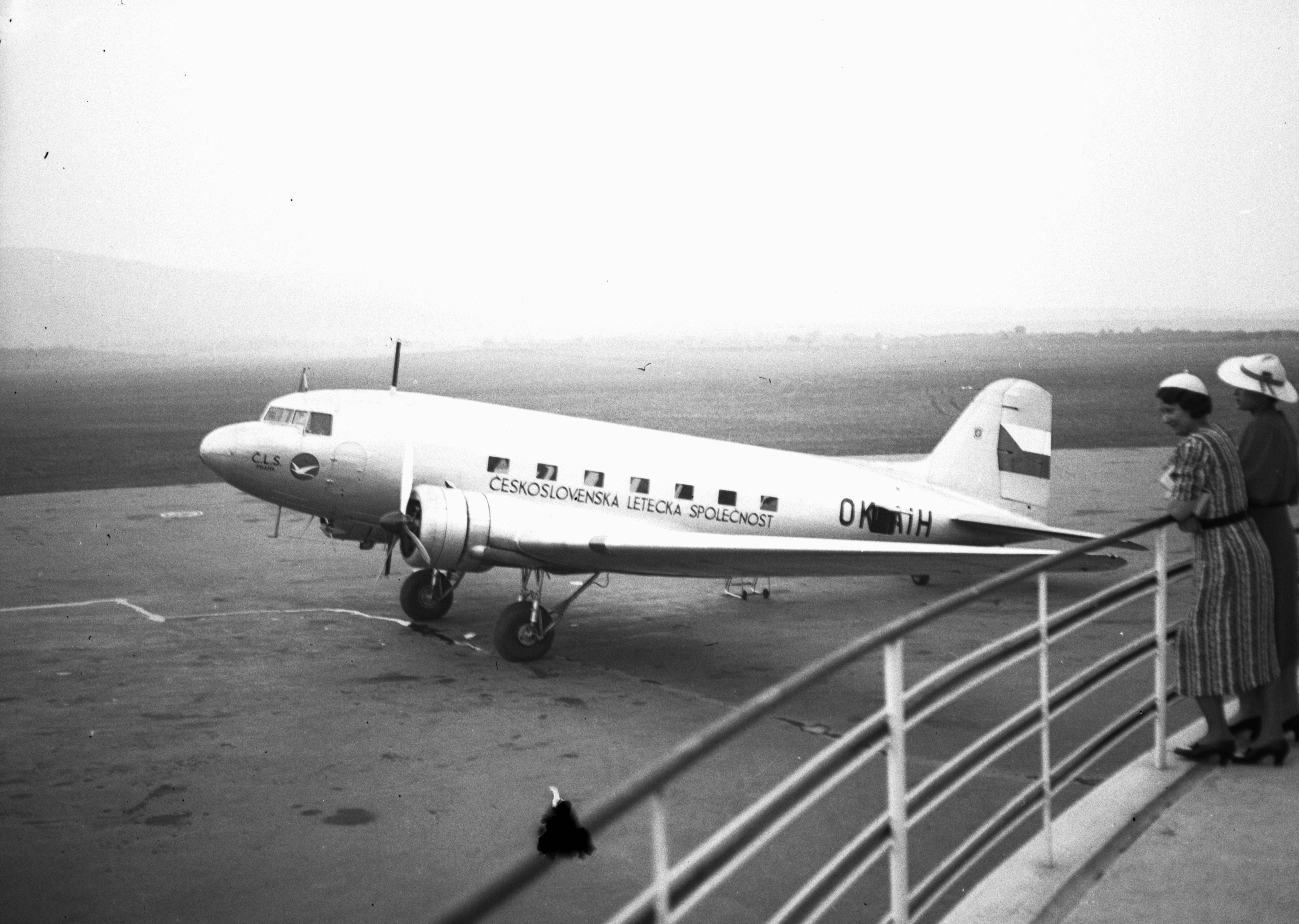 a csehszlovák ČLS légitársaság Douglas DC-3 típusú utasszállító repülőgépe. Location: Hungary, Budapest XI., Budaörs Airport Tags: airplane, airport, american brand, McDonnell Douglas-brand, Budapest Title: a csehszlovák ČLS légitársaság Douglas DC-3 típusú utasszállító repülőgépe.